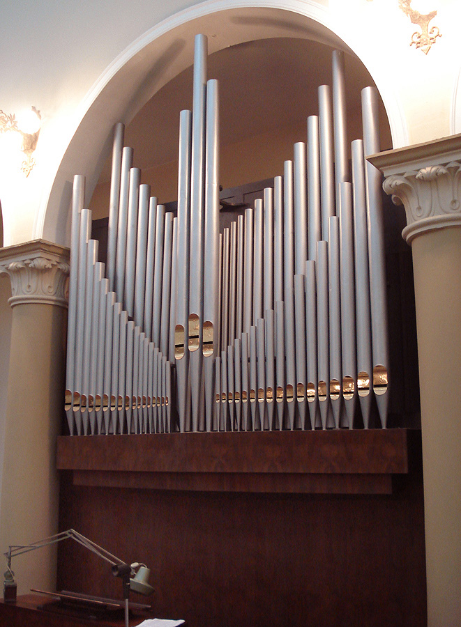 Interior da Igreja de Santa Cecília: o órgão. Porto Alegre, Brasil.